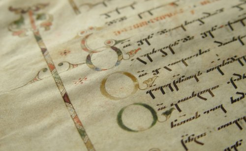 ხელნაწერი გვერდი მიქაელ მოდრეკილის იადგარიდან